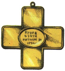 Крест «За взятие Праги» (1794)